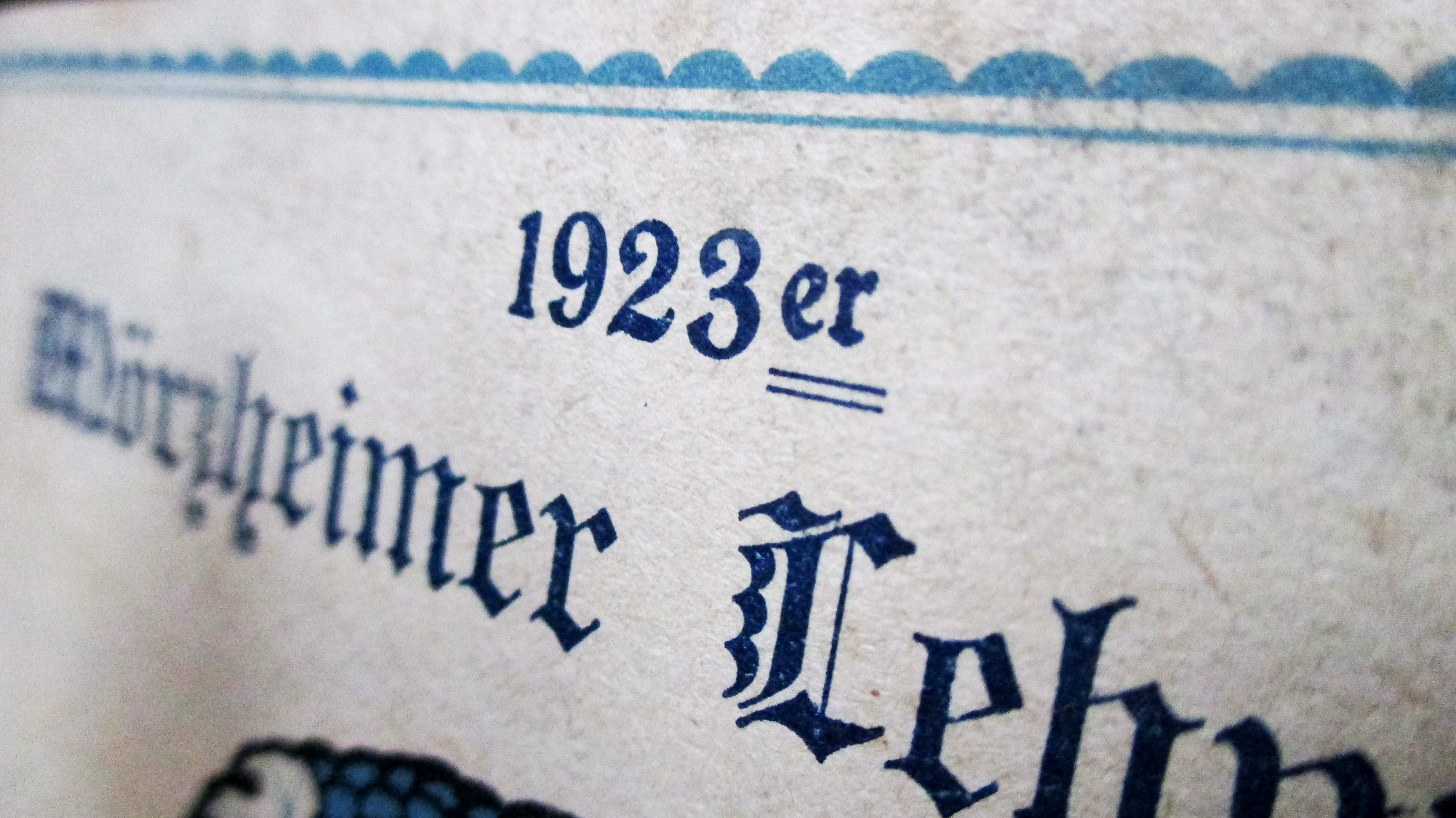 1923_Mörzheimer Lehmgrube_Weinettiket